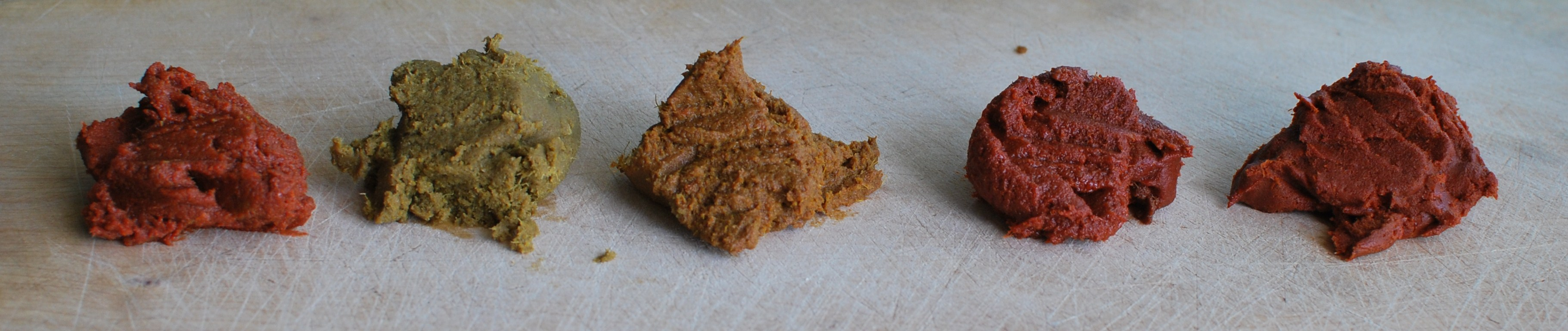 Curry pastes from Thailand, product Agroy-D fra Agi Foods. From left: Red, green, yellow, Penang / Penaeng, mussaman / massaman Karripastaer produsert i Thailand (produkt Arpy-D fra Agri Foods). Fra venstre: Rød, grønn, gul, Penang, mussaman